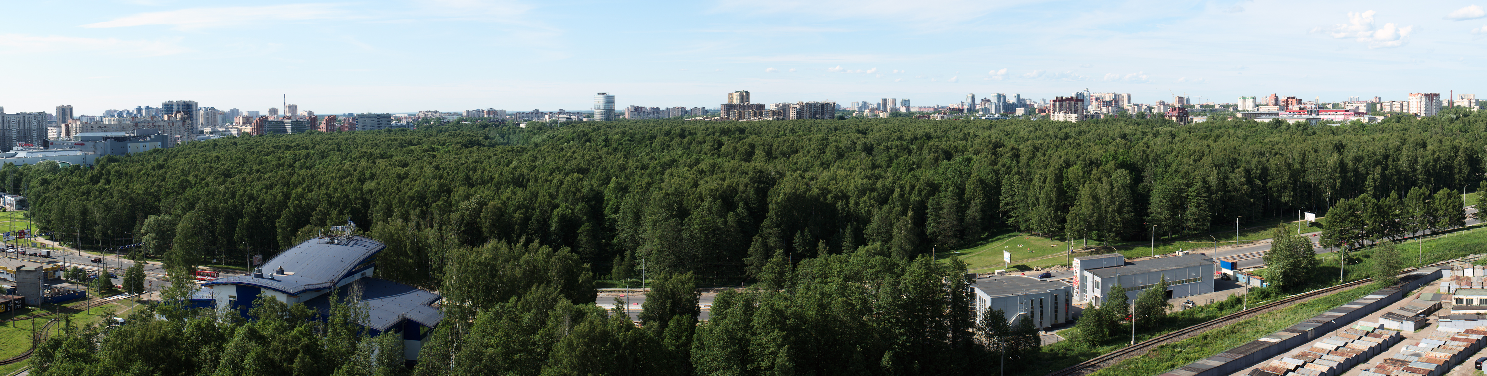 Вид на Удельный парк с высоты, со стороны ул. Матроса Железняка